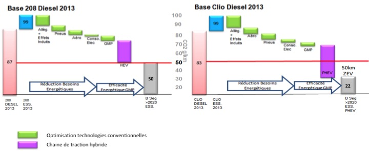 Feuille de route pour 2l/100km : contribution des différentes technologies